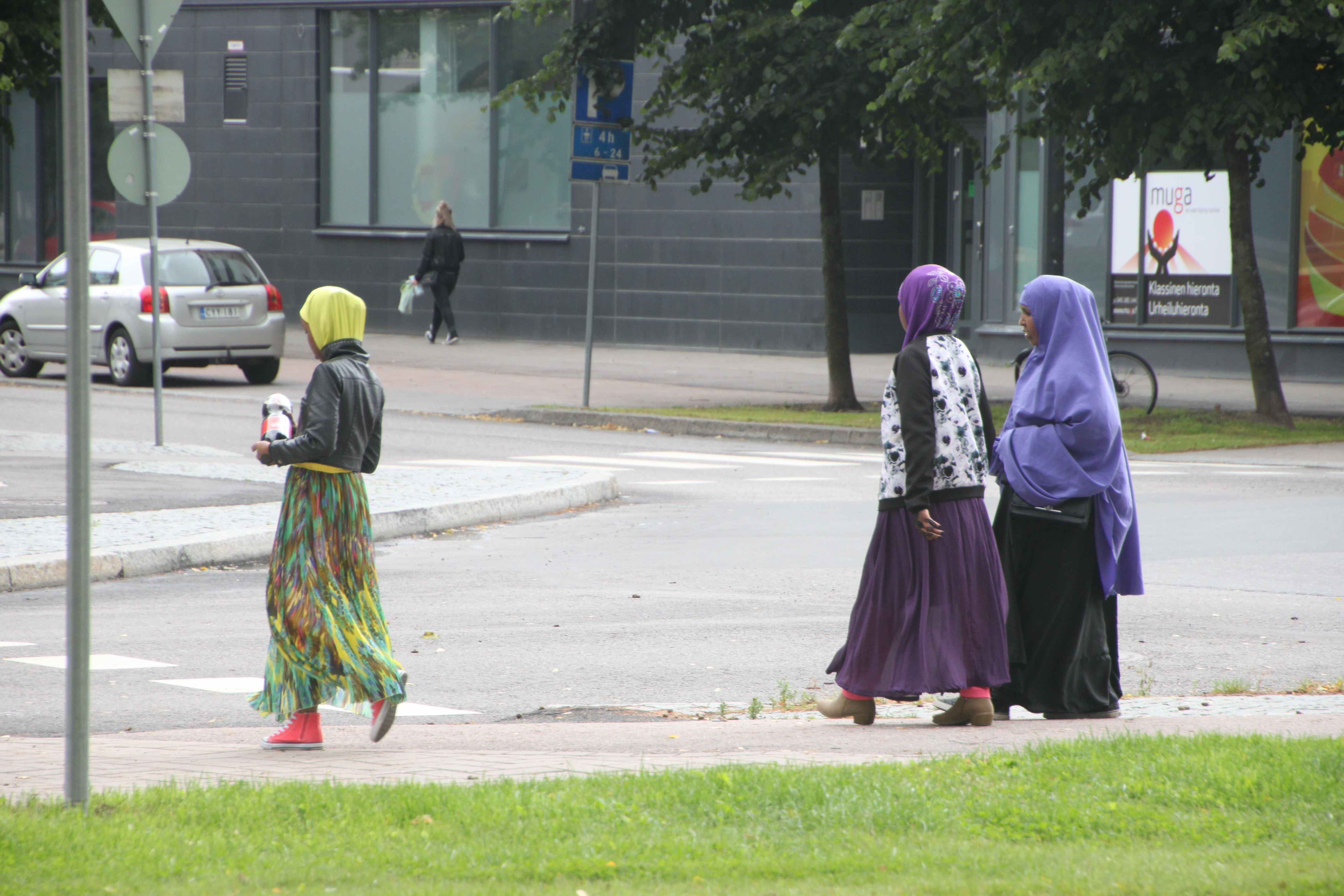 Multi-Kulti in Vuosaari